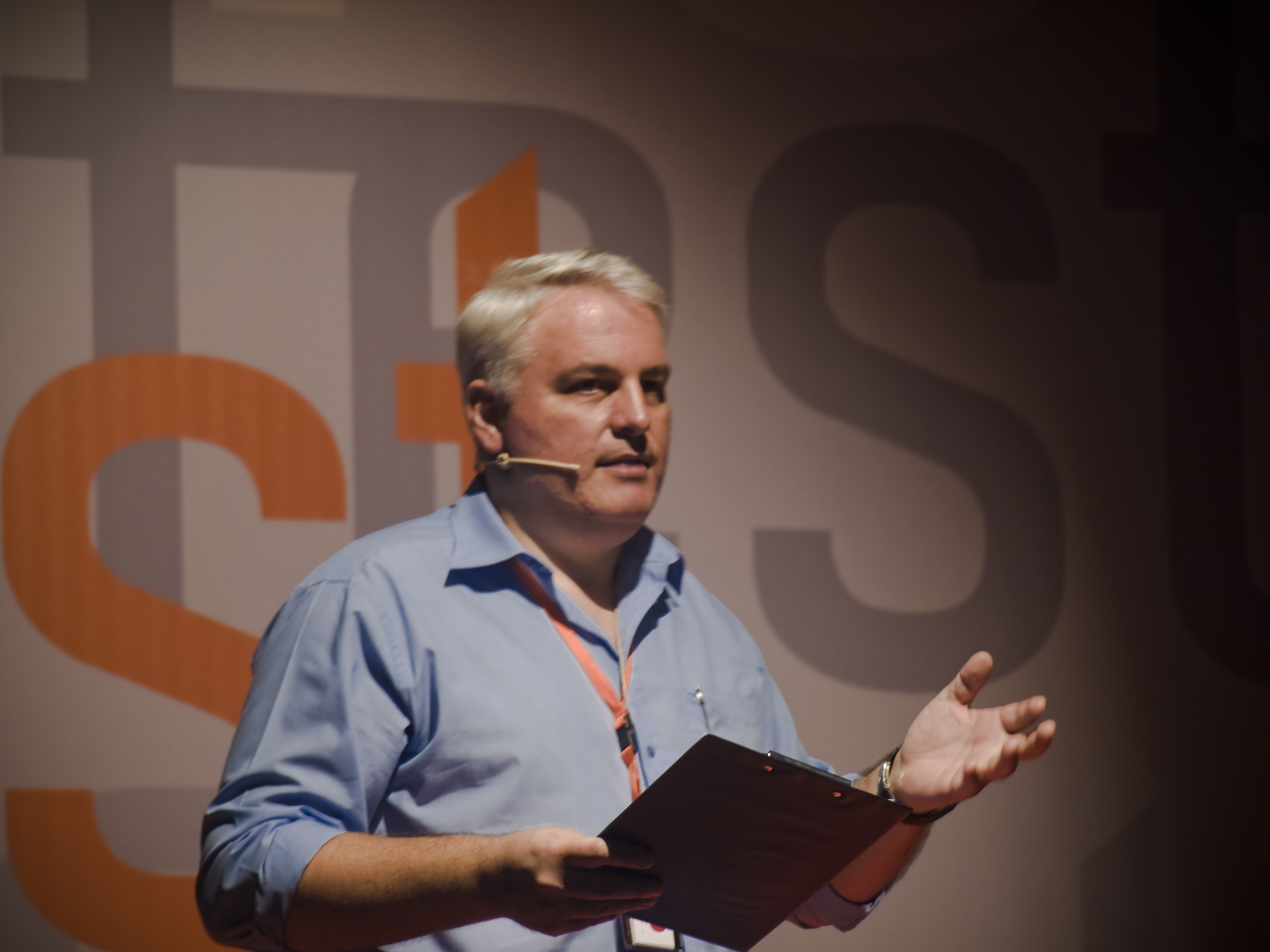 Bruno Giussani at iFest 2008